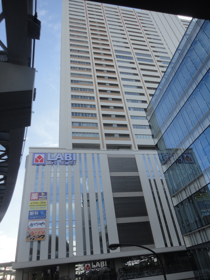 プラウドタワー立川（旧・第一デパート跡地）